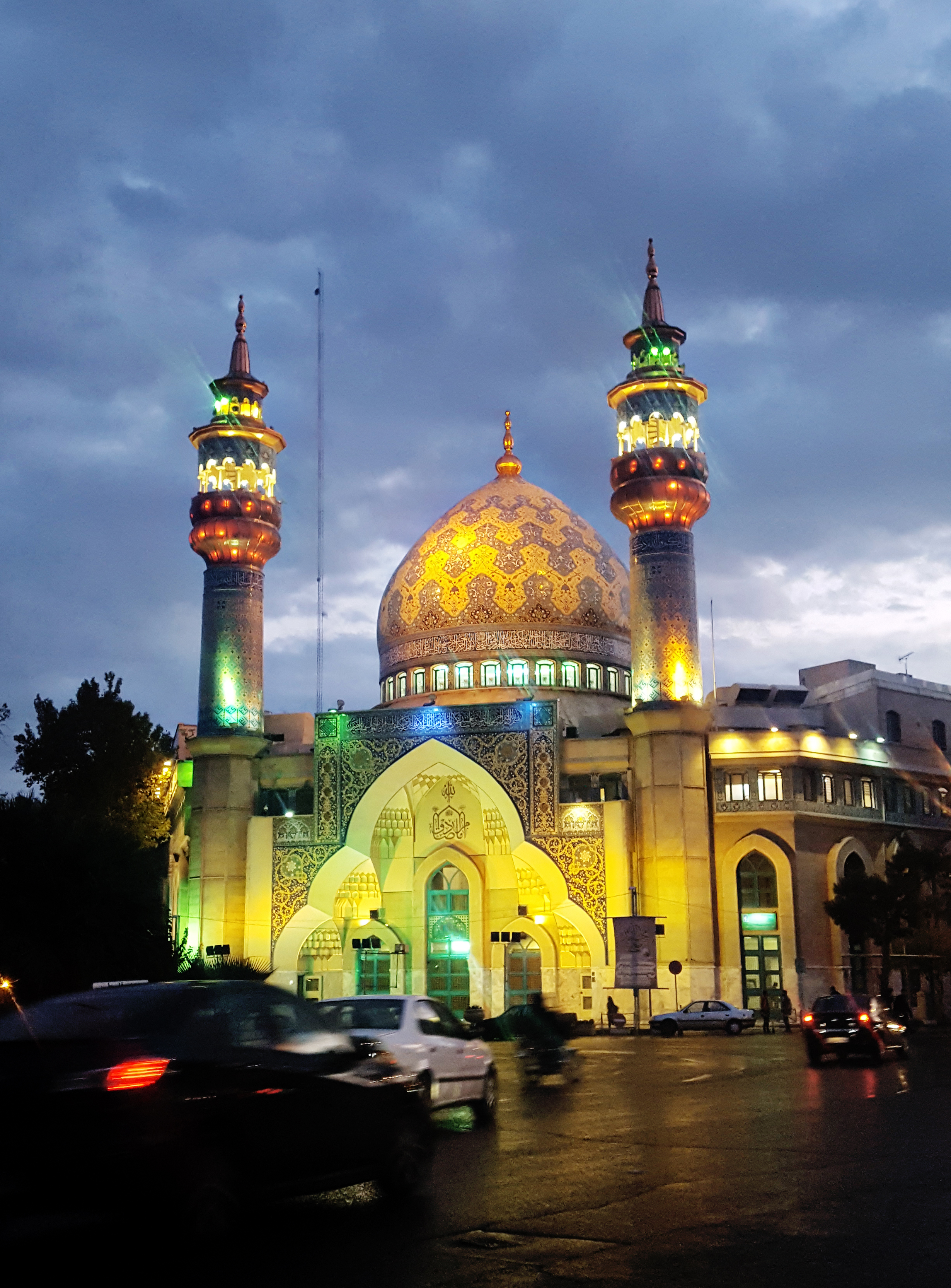 مسجد امام صادق میدان فلسطین